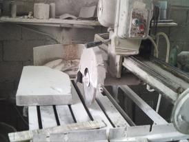 Геолошко рударски техничар